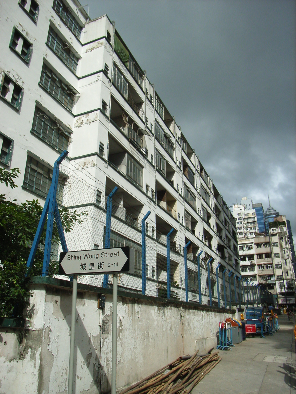 荷李活道警察宿舍 是香港一處前已婚高級警察宿舍，位於港島中西區的zh:荷李活道 by TangHon